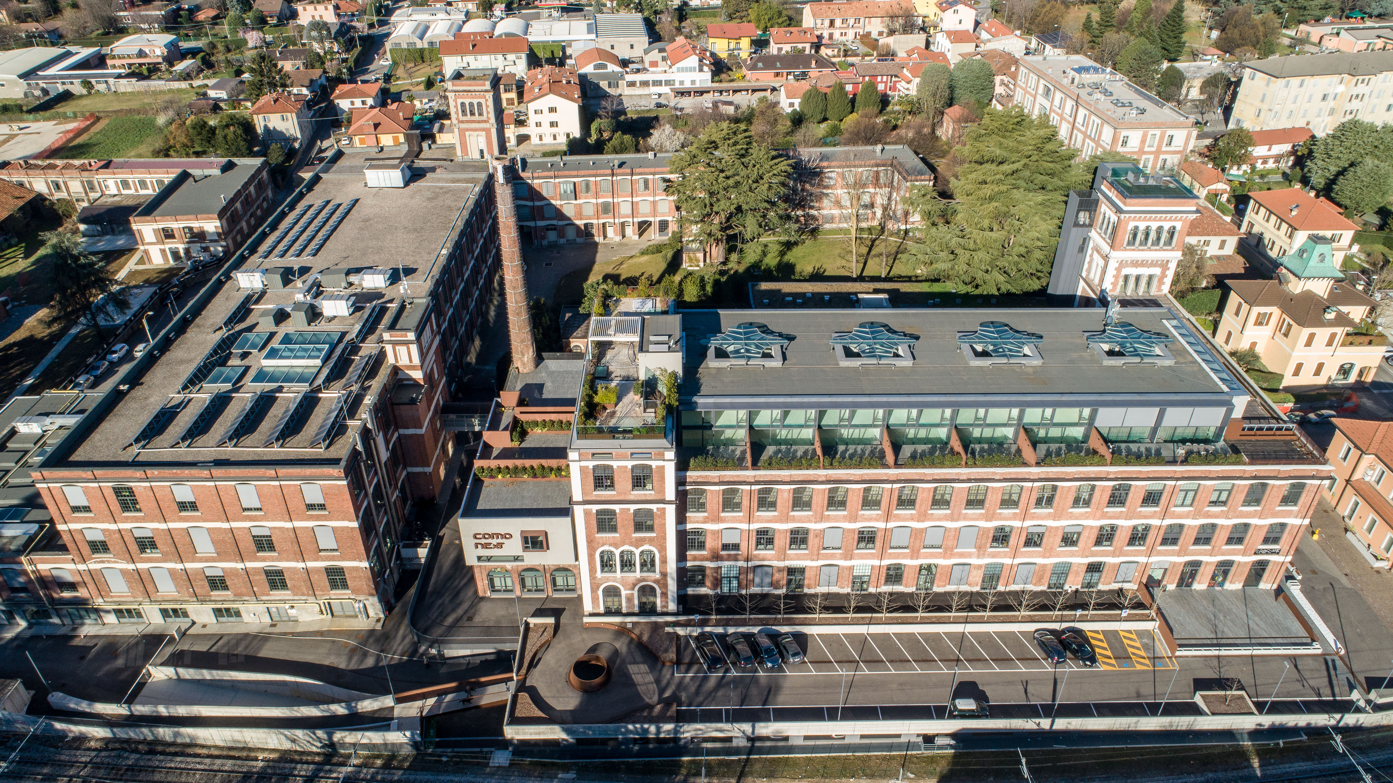 Veduta frontale del parco scientifico ComoNExT